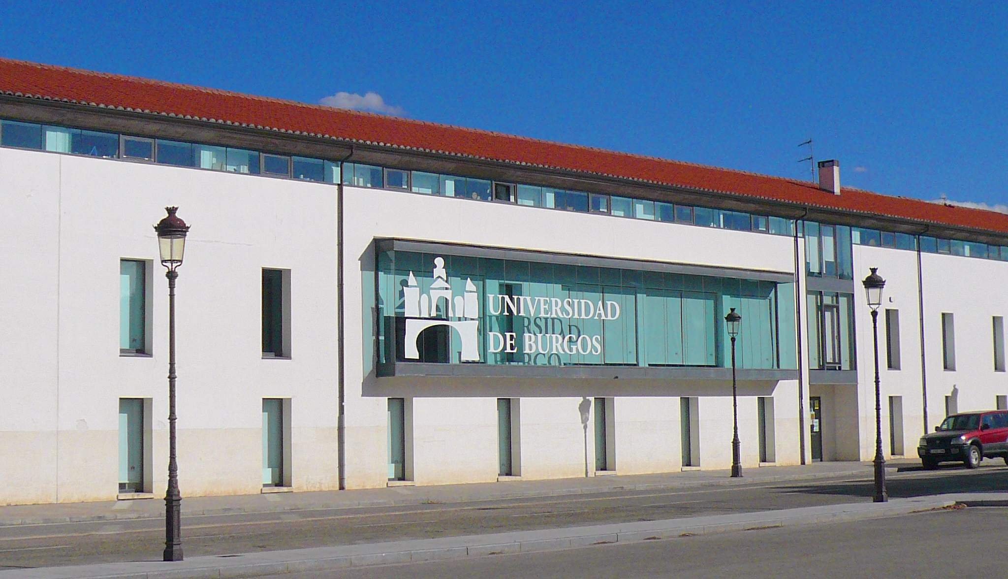 Rectorado y dependencias administrativas de la Universidad de Burgos (UBU), en el Campus de San Amaro